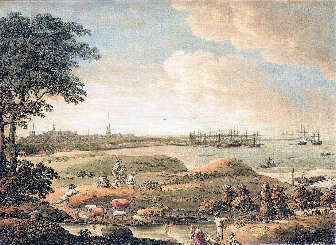 Tallinn Vaade linnale 1816